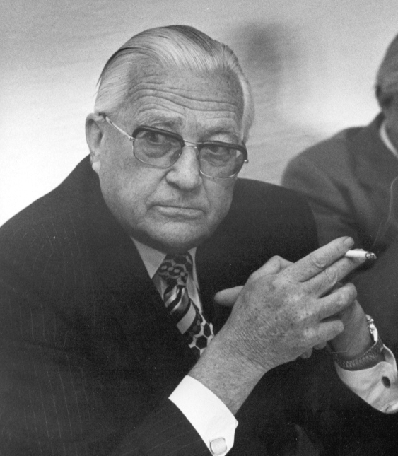 Wilhelm Kuntner. Foto rechts zugeschnitten